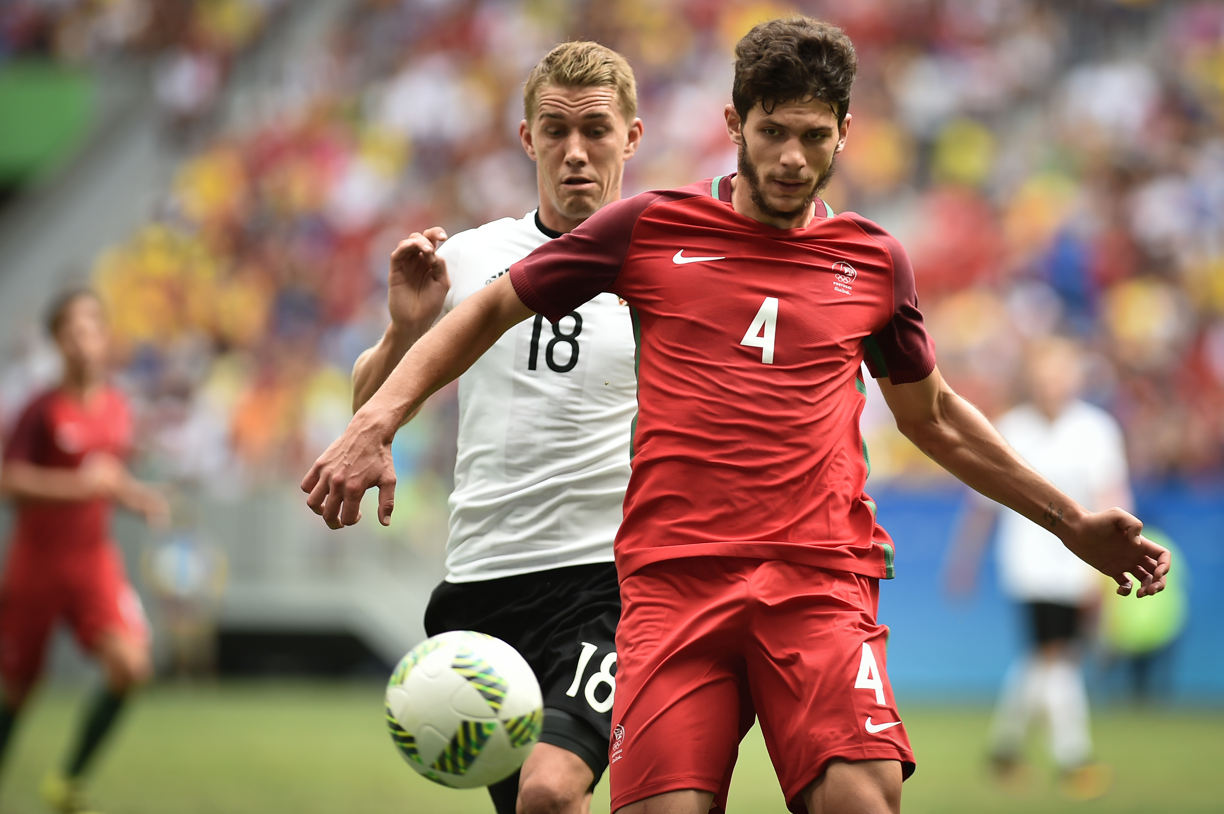 Estádio Nacional de Brasília Mané Garrincha, Brasília, DF, Brasil, 13/8/2016 Foto: Andre Borges/Agência Brasília Portigal e Alemanha jogam neste sábado (12), no Estádio Mané Garrincha, pelas quartas de final do futebol masculino nas Olimpíadas 2016.